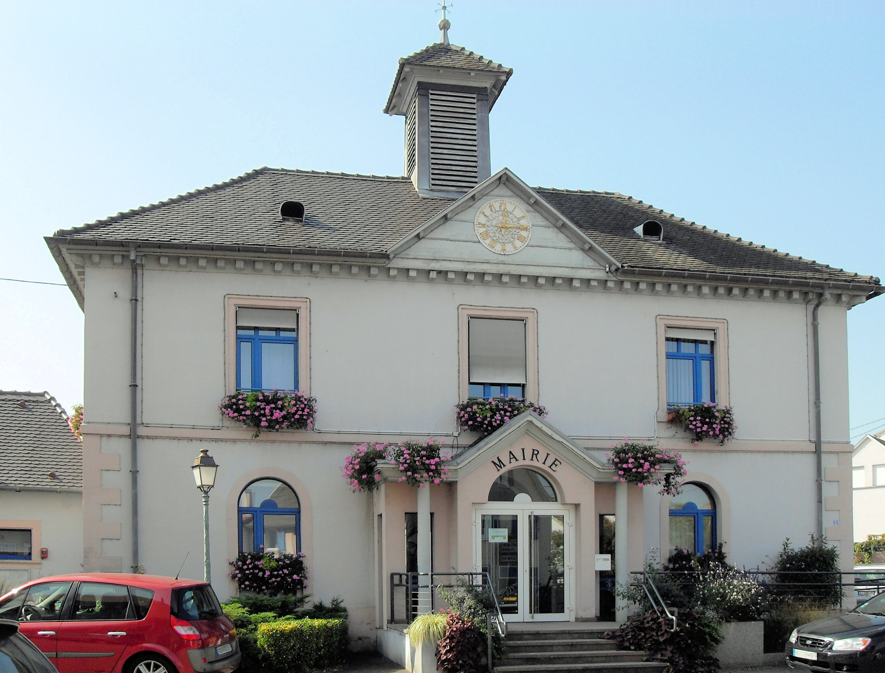 La mairie d'Andolsheim